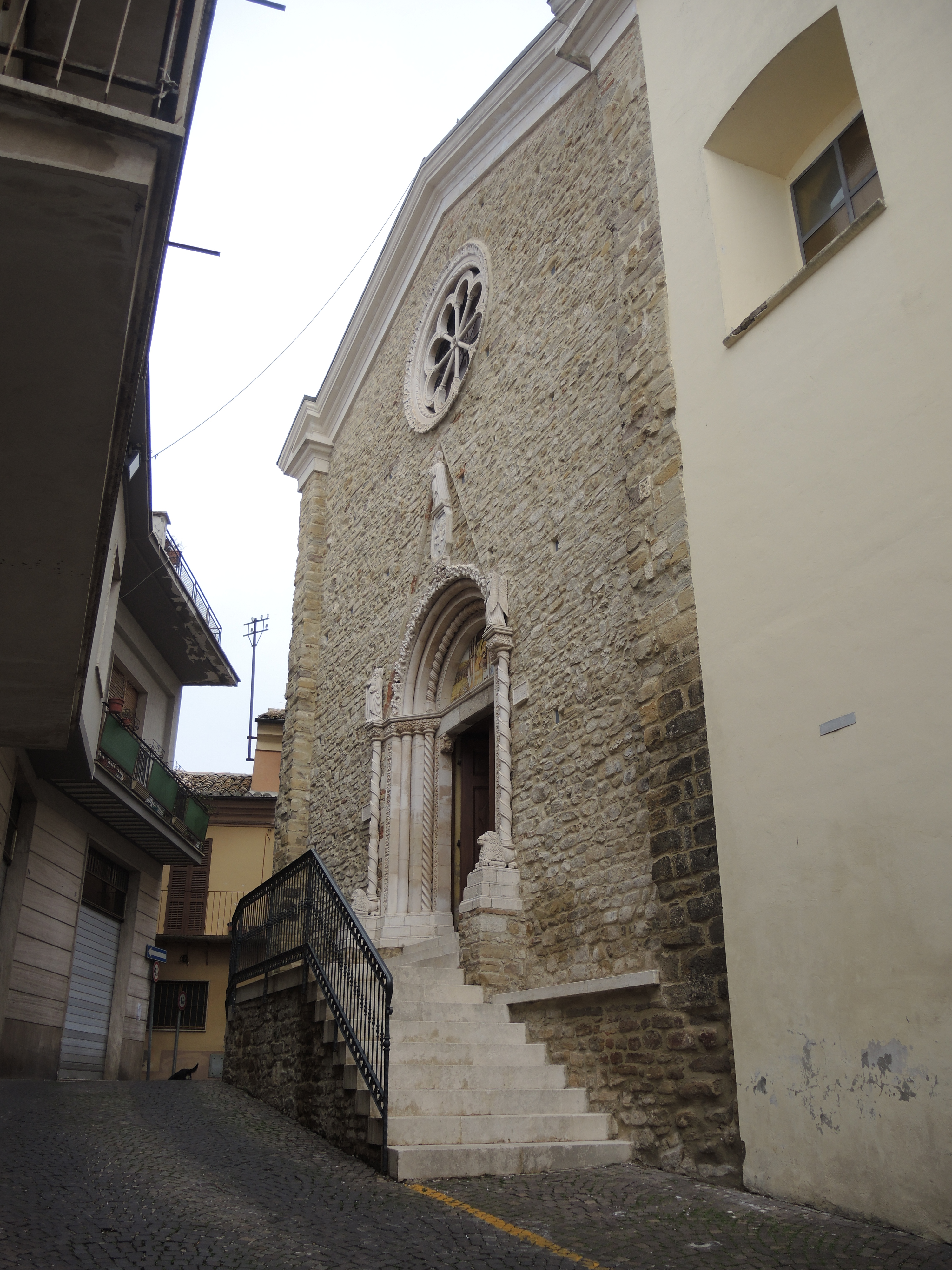 Cellino Attanasio: Chiesa di Santa Maria la Nova